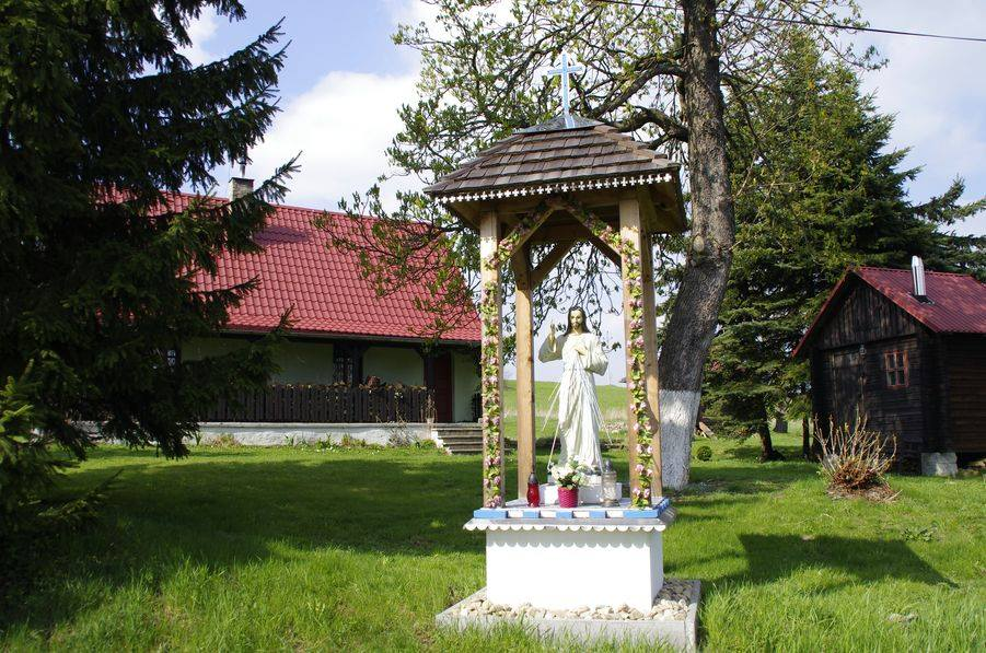 Volyně - rok 2014